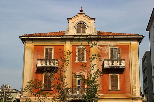 Altes Wohnhaus in Chiasso